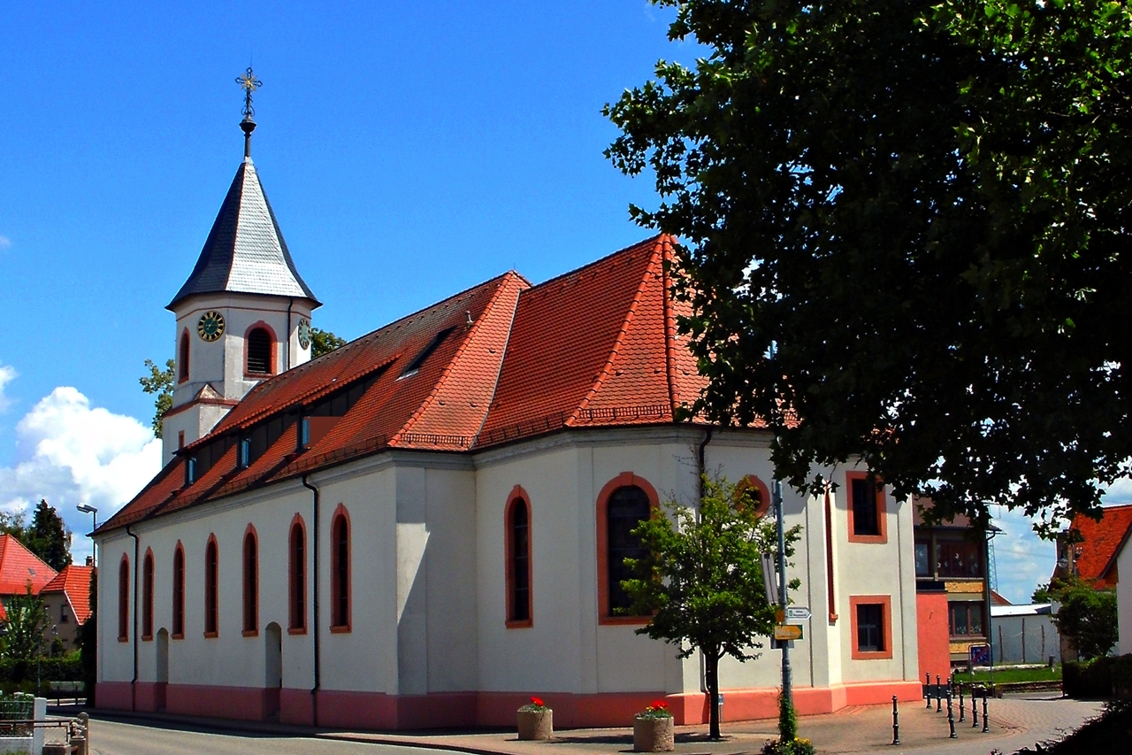 Elchesheim, 76477 Elchesheim-Illingen, Germany